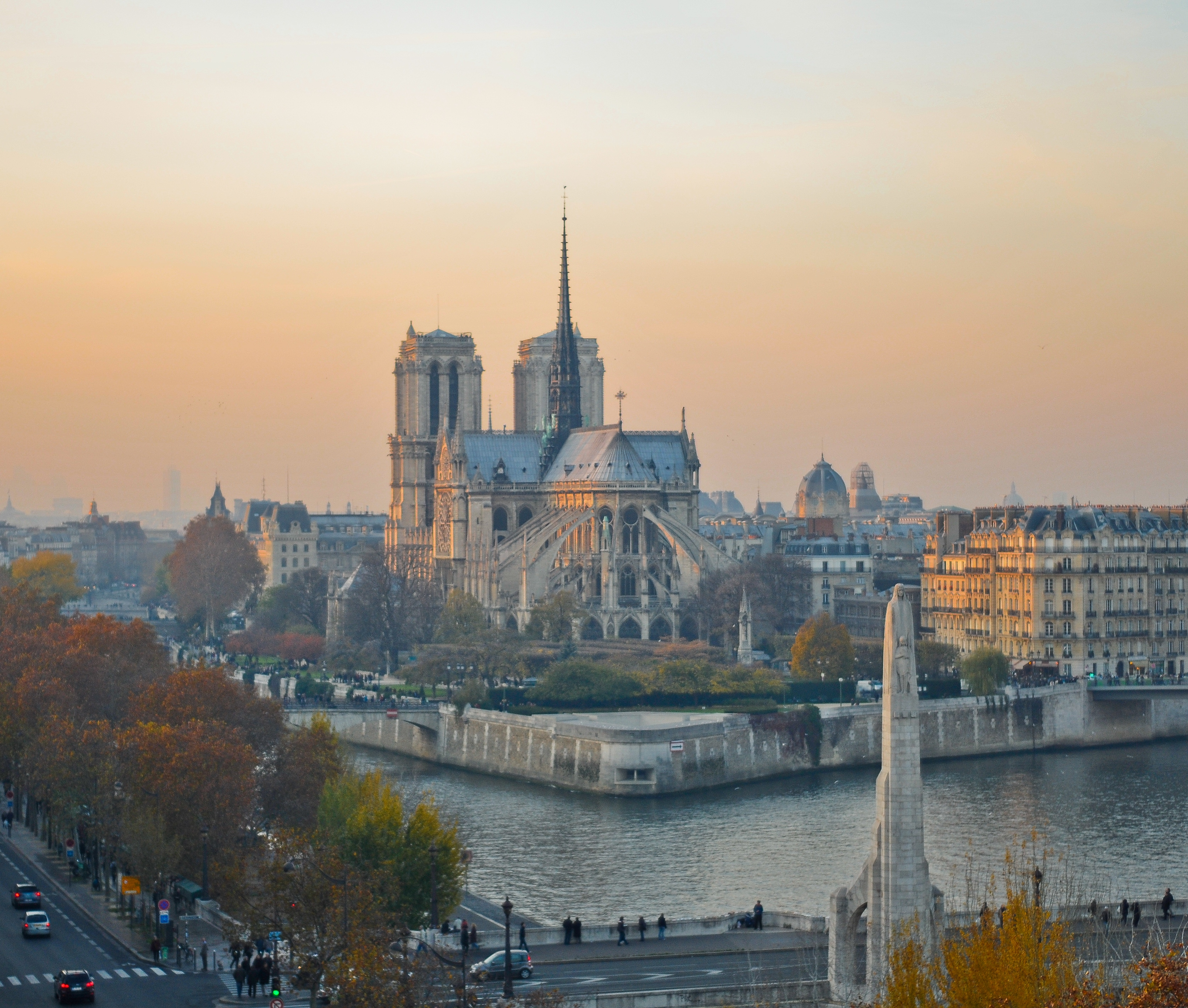 Couché de soleil sur Notre Dame, pris depuis l'Institut du Monde Arabe, Paris, France.